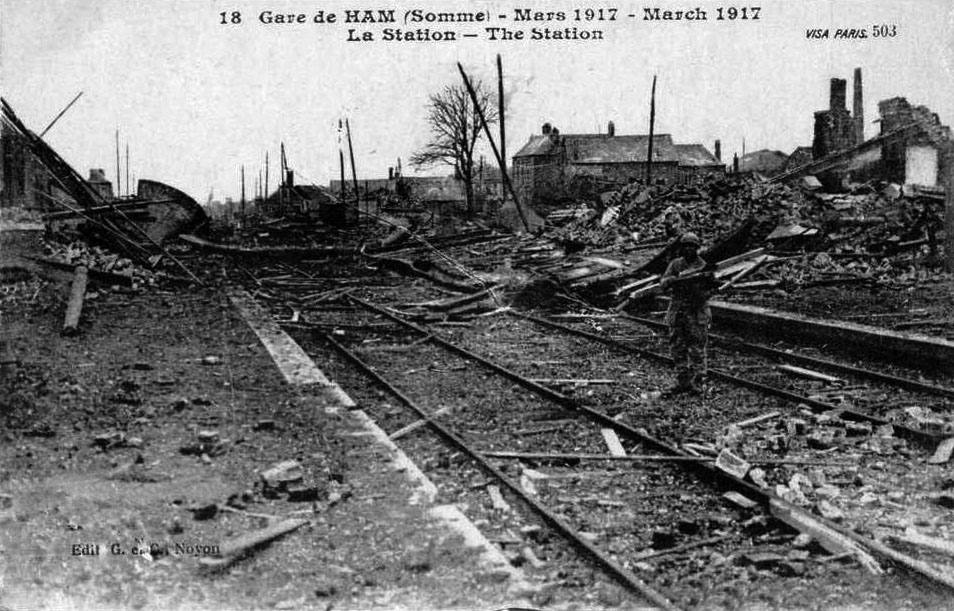 La gare de Ham (Somme) en mars 1917 après sa destruction.